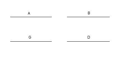 il·lustració d'una de les proposiciones de les Data d'Euclides